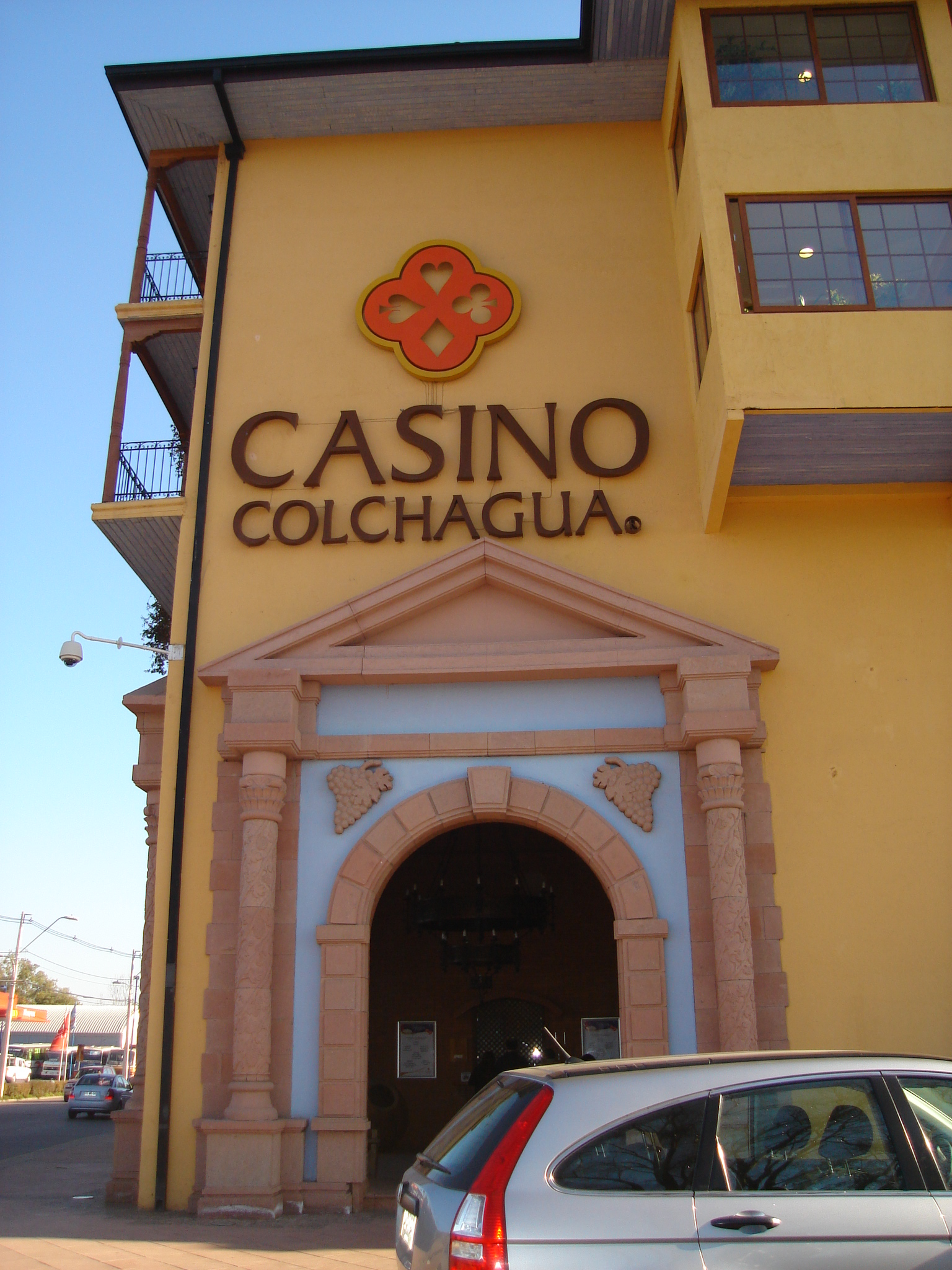 Casino Colchagua, Santa Cruz, Chile.